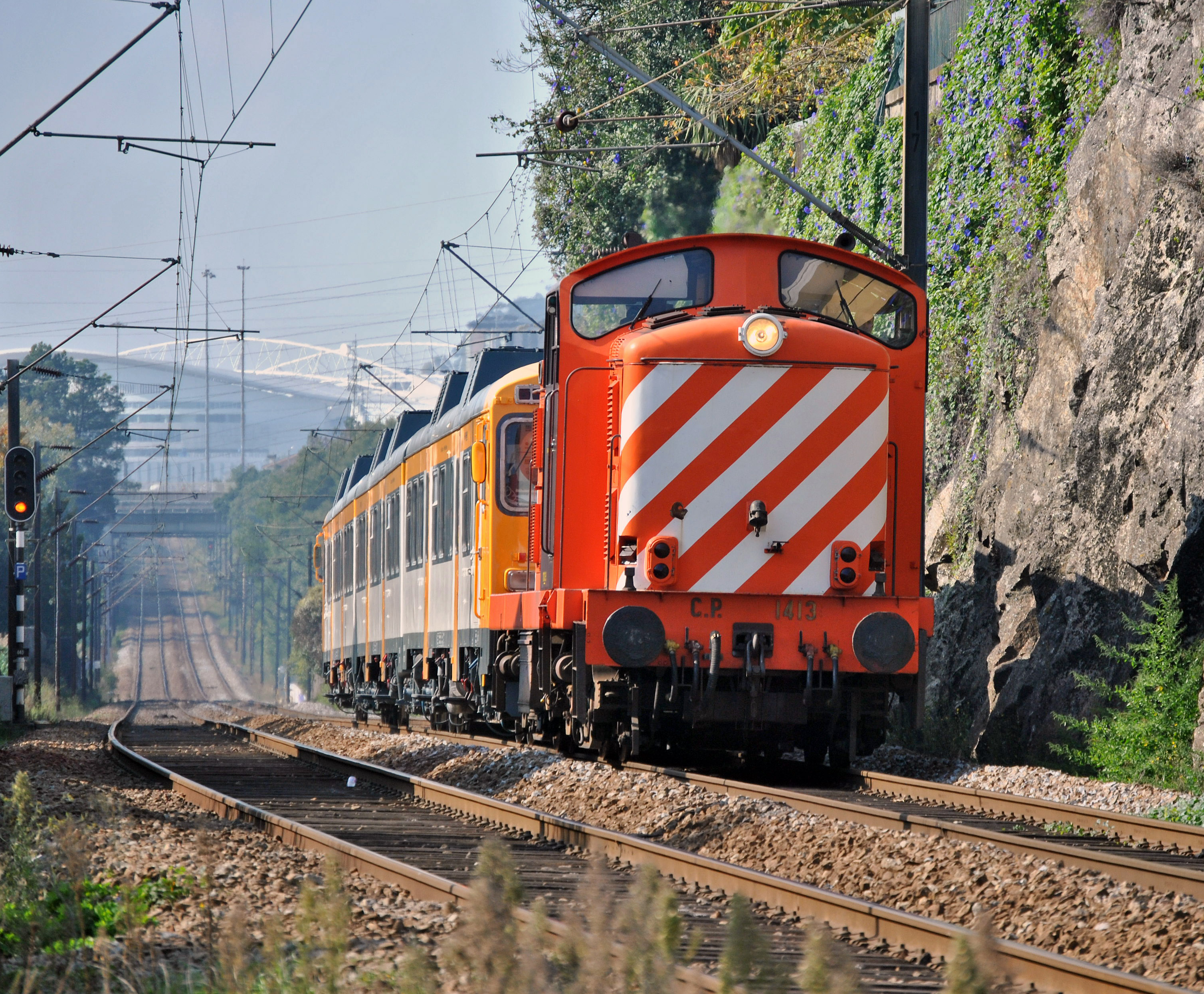 Marcha especial para Valença